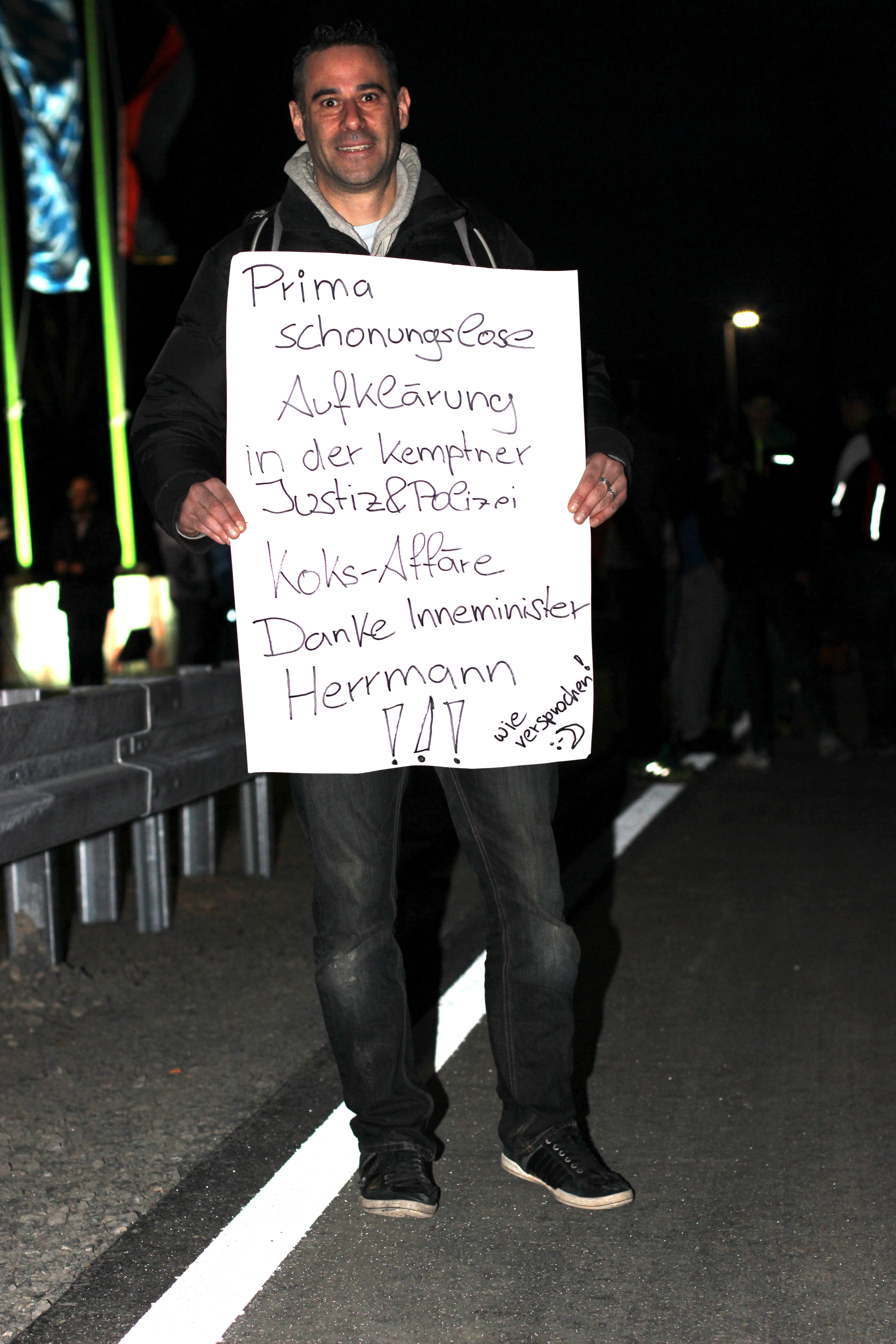 Stefan Albanesi (Die Linke) mit seinem Protestplakat: Er kritisiert in Anwesenheit des Bayerischen Innenministers die seiner Meinung nach ungenügende Aufklärung der Koksaffäre der Kripo Kempten.